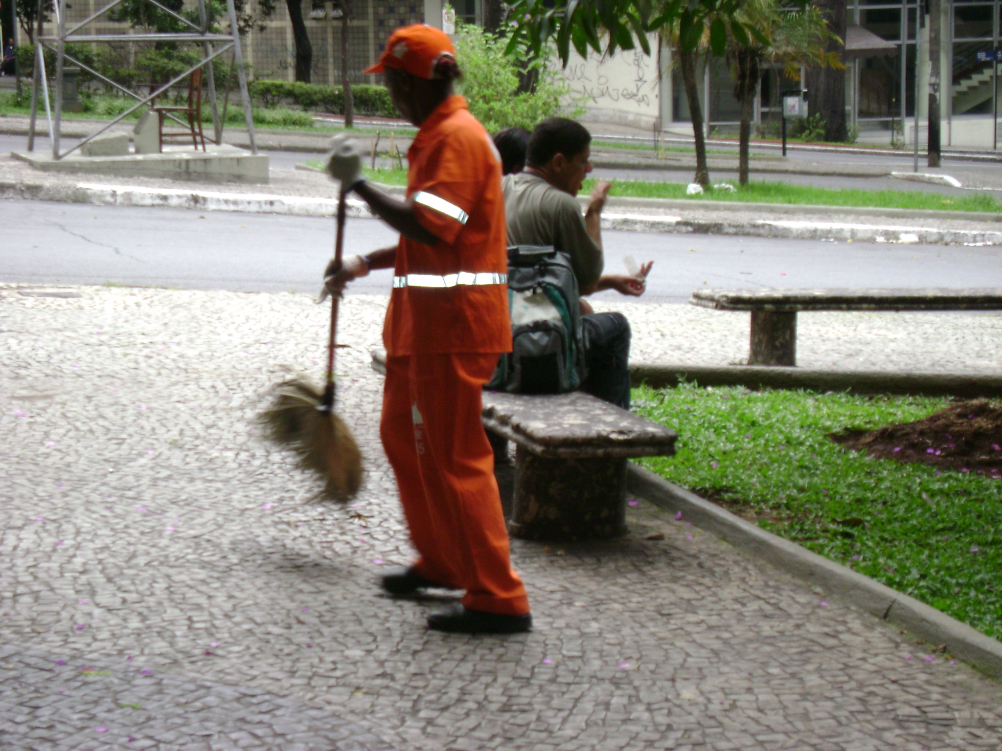 Faxineiro da prefeitura em Belo Horizonte.